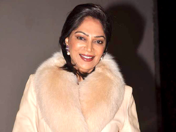 Simi Garewal at Farah Khan's birthday bash